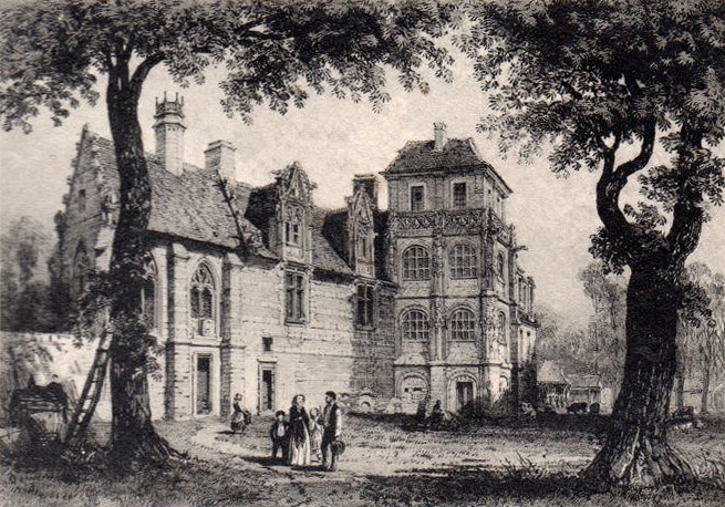 Darstellung des Schlosses Ételan auf einer alten Postkarte